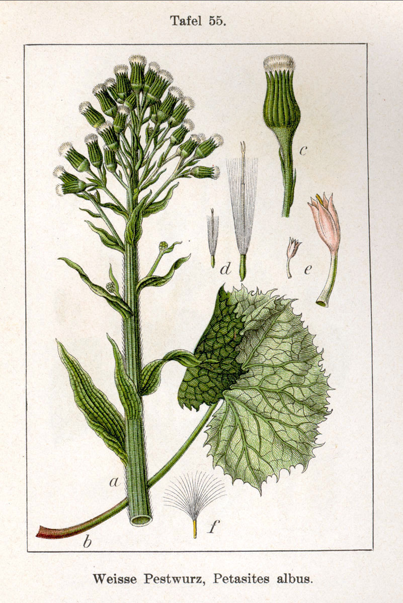 Petasites albus (L.) P. Gaertn. Original Description Weisse Pestwurz, Petasites albus